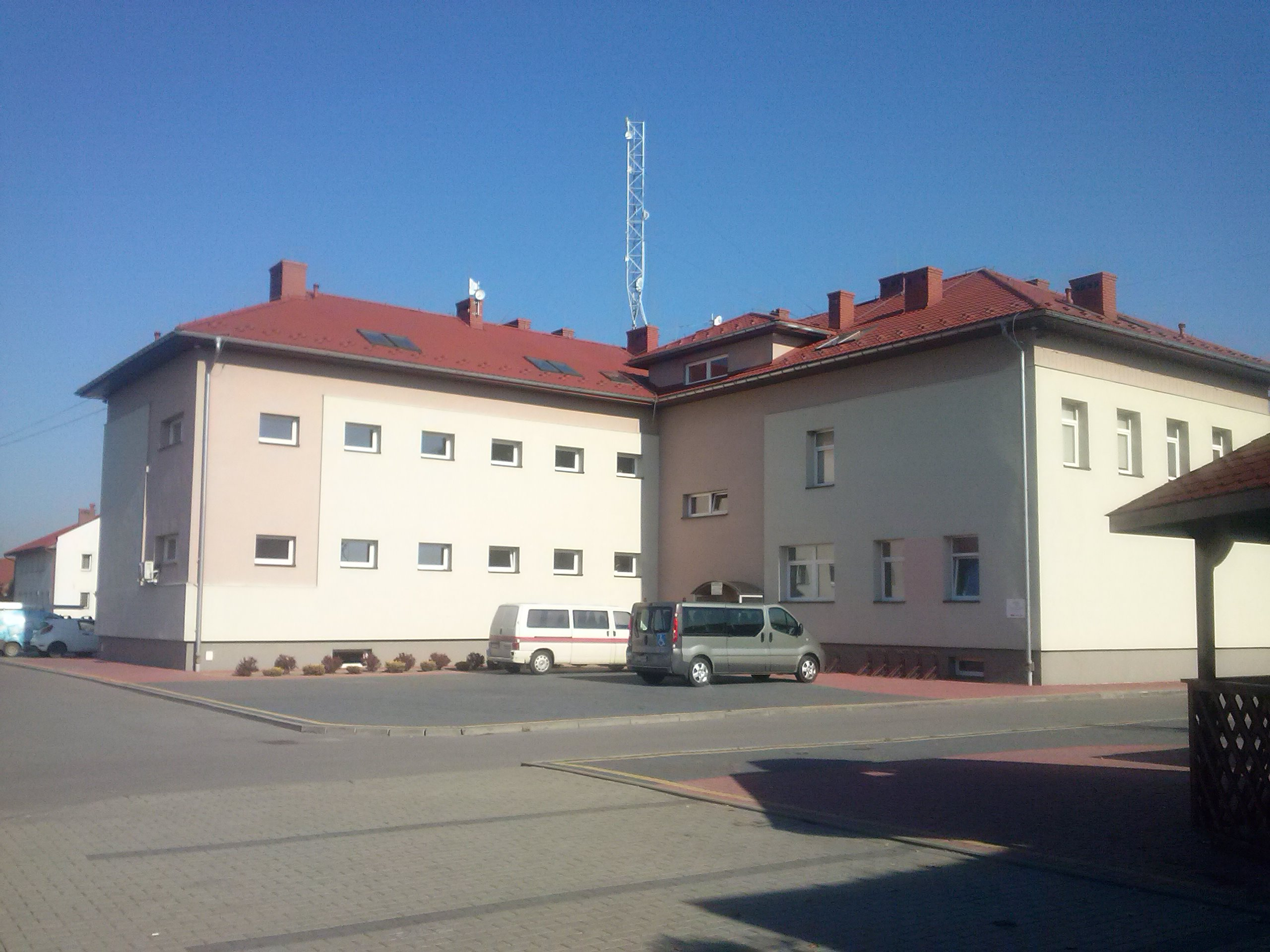 Wiejski Dom Kultury w Tryńczy